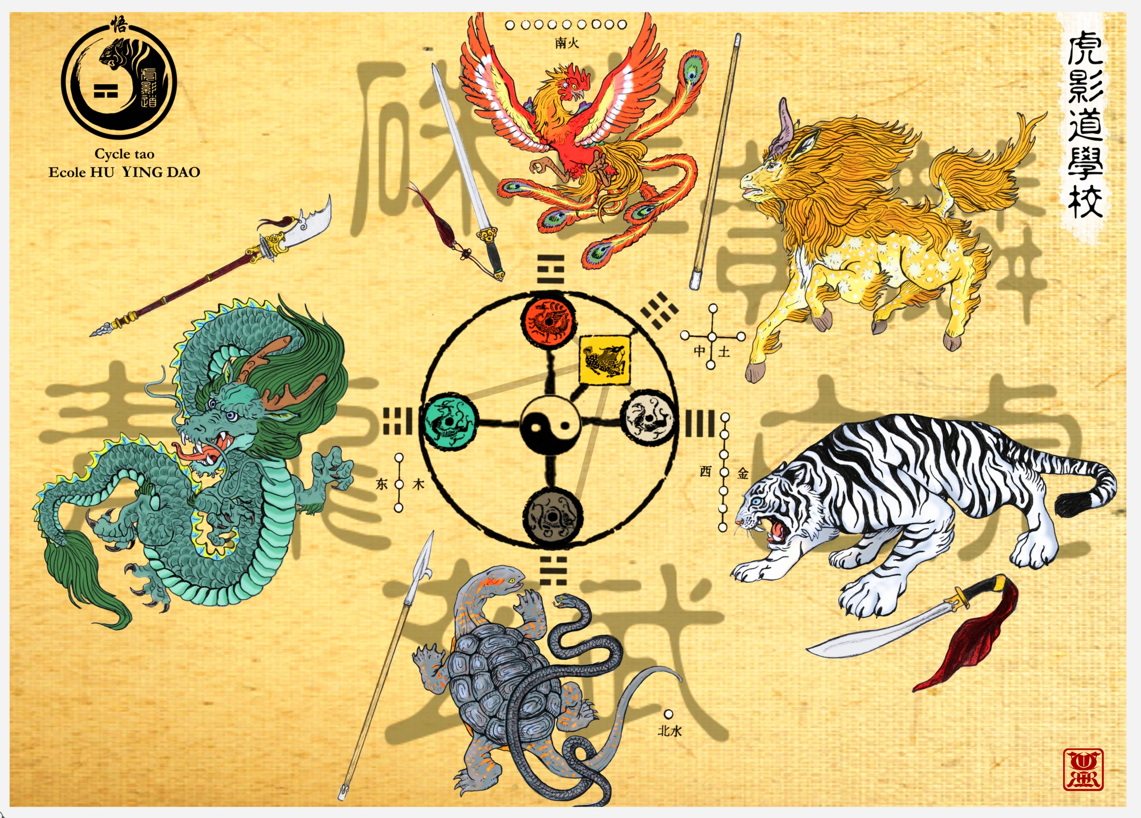 Cycle Tao - Evolution cardinale